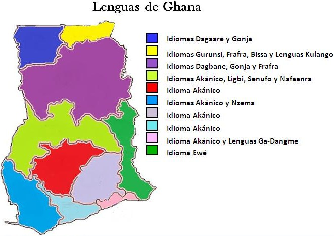 Mapa de las lenguas de República de Ghana, mostrando diferentes grupos de la sistemática del Níger-Congo-familia de como exmples del lenguas Kwa (Idioma Akan), y las lenguas Ga-Dangme (Ga) rama , y el Sudeste Volta-grupo de la Volta-Congo-lenguas rama (Idioma Ewe).